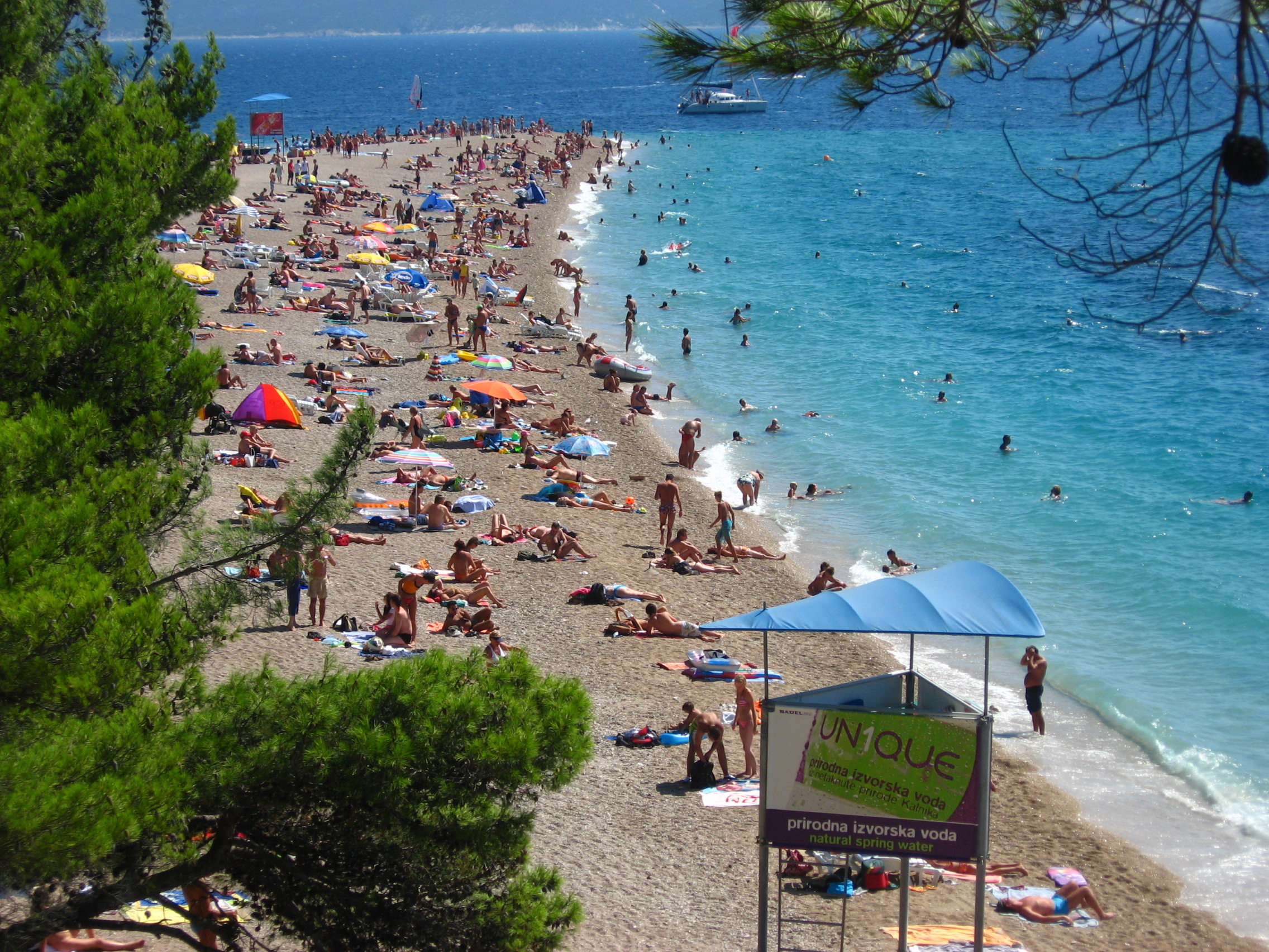 Zlatni Rat1